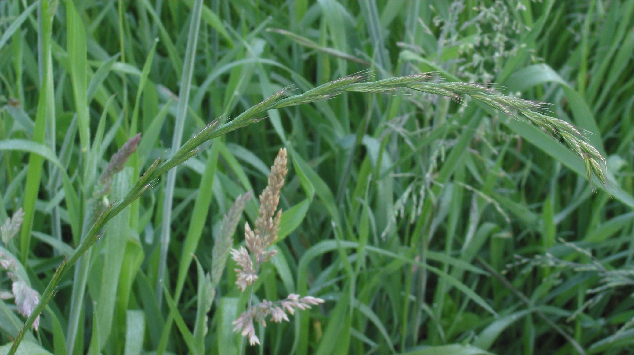 (Kweek bloeiwijze) Elytrigia repens